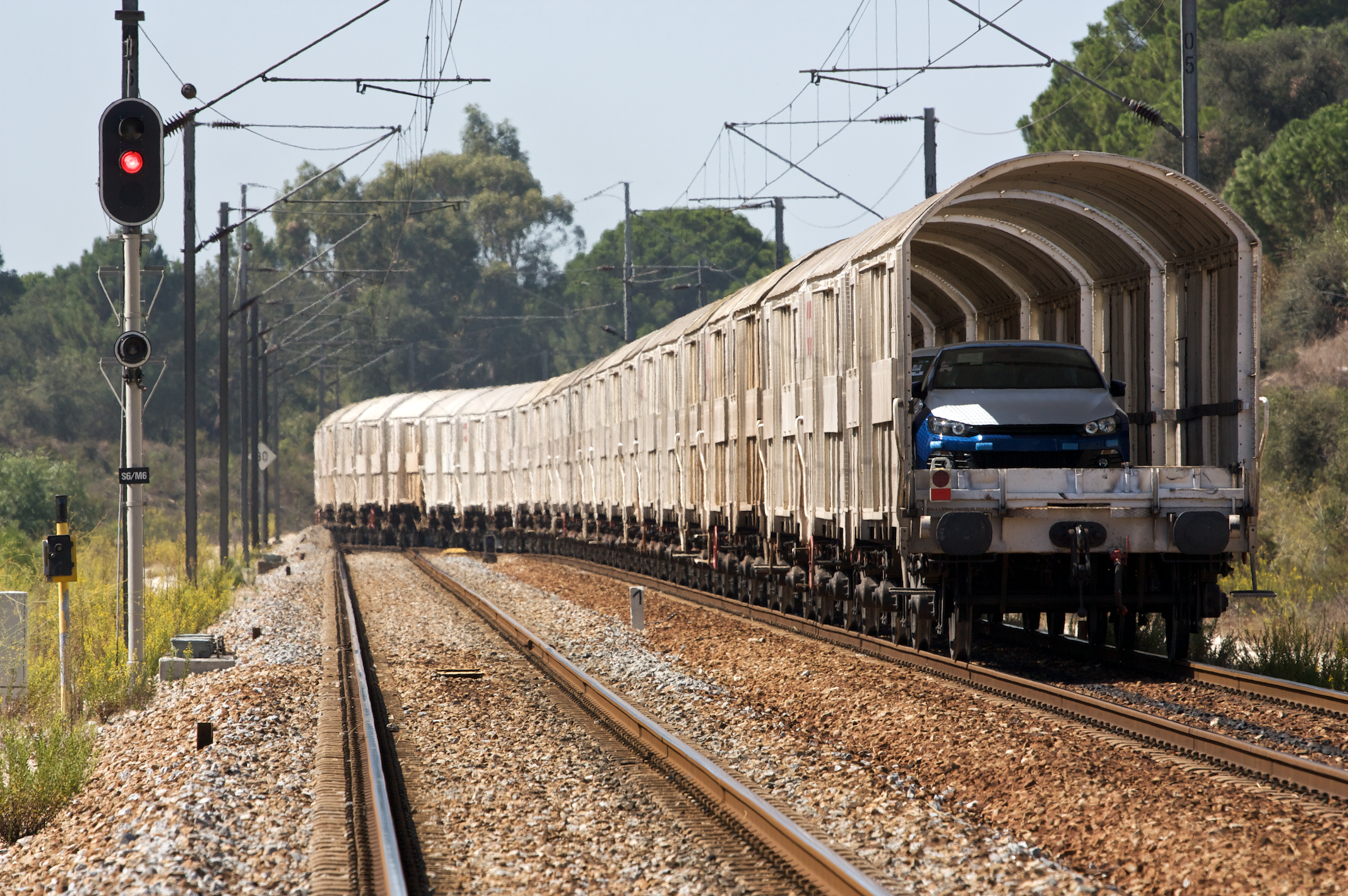 Tipo: Vagões para transporte de automóveis Local: Estação de Águas de Moura [Linha do Sul, PK 44] Data e hora: 25 de Setembro de 2009 [12h28] Material: CP Hccerrs [série 291 2]